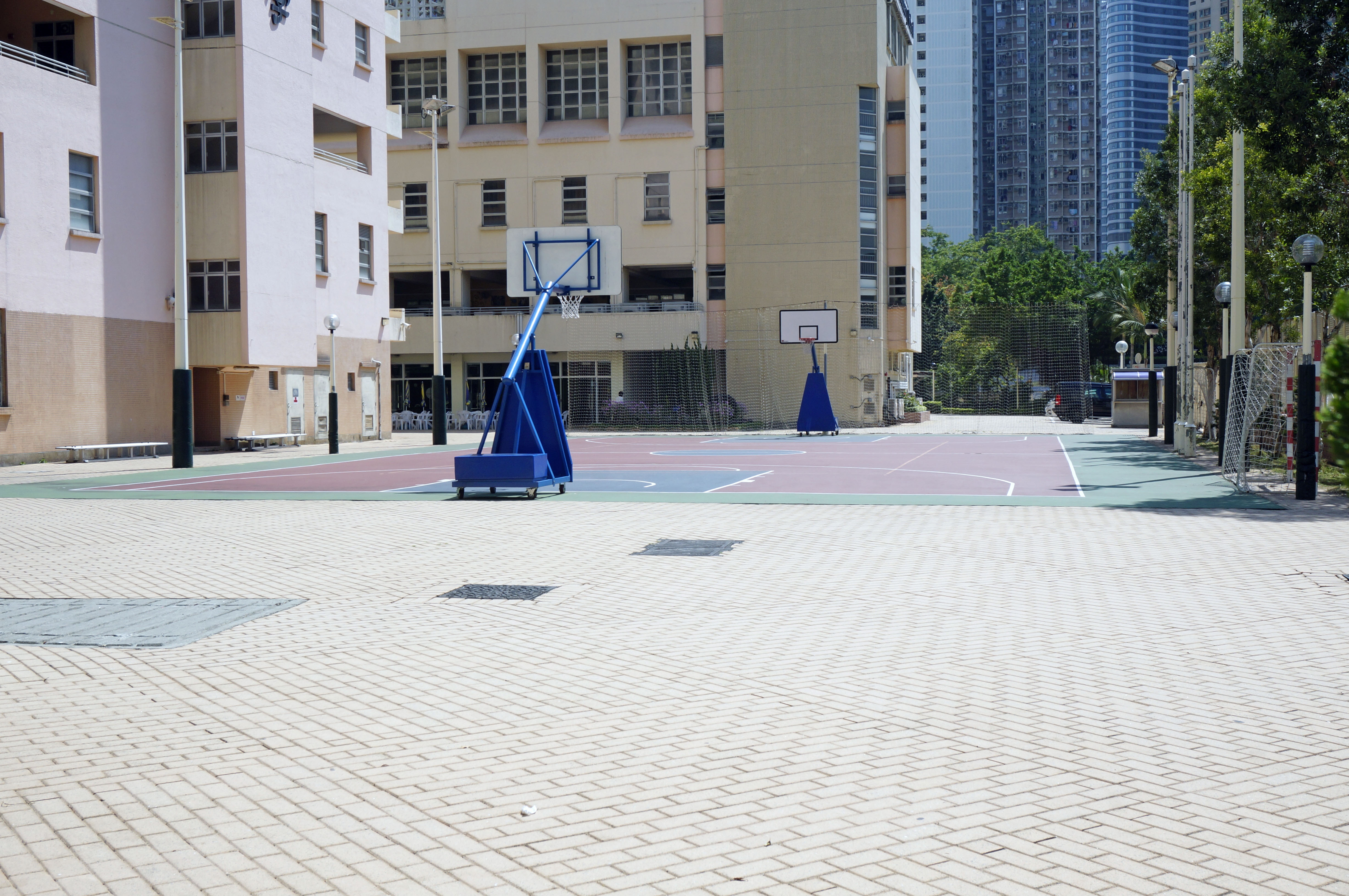 寶覺中學校舍球場